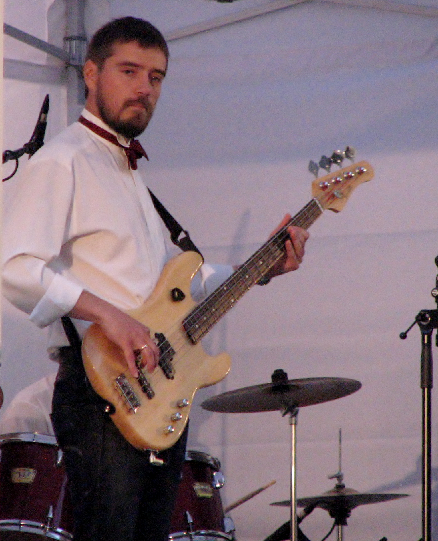 Priit Võigemast Tallinna Linnateatri 48. hooaja avamisel